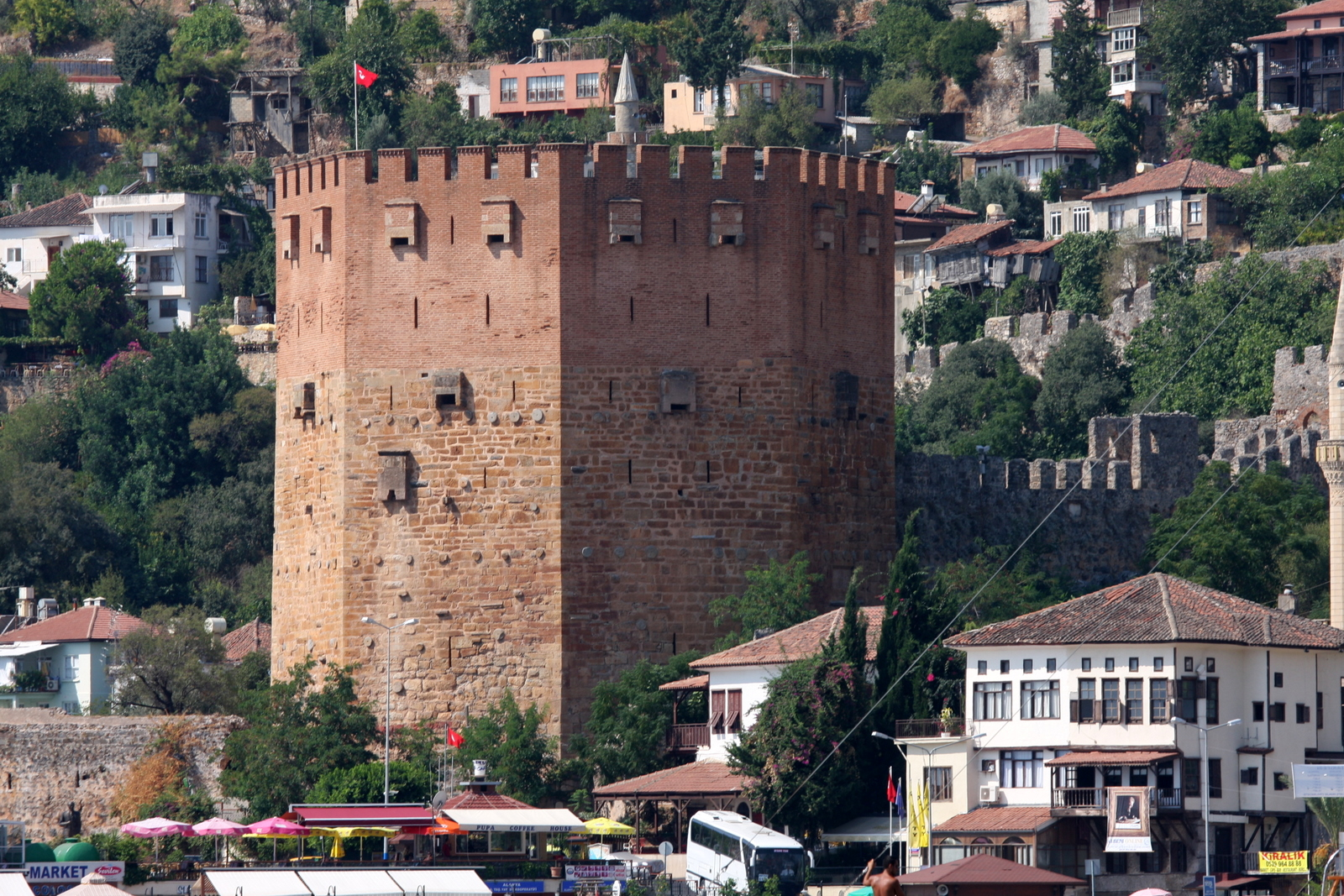 Det Røde Tårn, Alanya